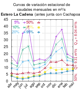 Curva de Variación Estacional del estero La Cadena antes junta río Cachapoal. # cita publicación # | apellido = Dirección General de Aguas # | nombre = # | enlace-autor = Ministerio de Obras Públicas (Chile) # | título = Diagnóstico y clasificación de los cursos y cuerpos de agua según objetivos de calidad. Cuenca del río Rapel # | ubicación = Santiago de Chile # | editorial = Ministerio de Obras Públicas (Chile) # | año = 2004 # | edición = # | url = # | urlarchivo = # | fechaarchivo = # | ref = harv # Tabla 4.3: La Cadena antes junta río Cachapoal (m3/s) pág. 56 mes 5% 10% 20% 50% 85% 95% abr 17.780 13.083 9.390 5.773 4.132 3.749 may 13.160 10.746 8.407 5.259 2.951 2.102 jun 34.829 23.047 14.130 5.885 2.458 1.724 jul 40.067 25.503 15.069 6.178 2.917 2.301 ago 14.814 11.729 9.014 5.859 4.006 3.451 sep 16.091 12.869 9.988 6.561 4.473 3.827 oct 15.358 13.938 12.307 9.524 6.715 5.365 nov 18.800 18.500 16.950 14.000 9.800 5.800 dic 32.580 26.979 21.469 13.873 8.102 5.908 ene 37.740 30.967 24.370 15.417 8.771 6.298 feb 19.704 17.518 15.240 11.799 8.742 7.355 mar 17.331 15.840 14.204 11.534 8.924 7.676 This plot was created with Gnuplot.